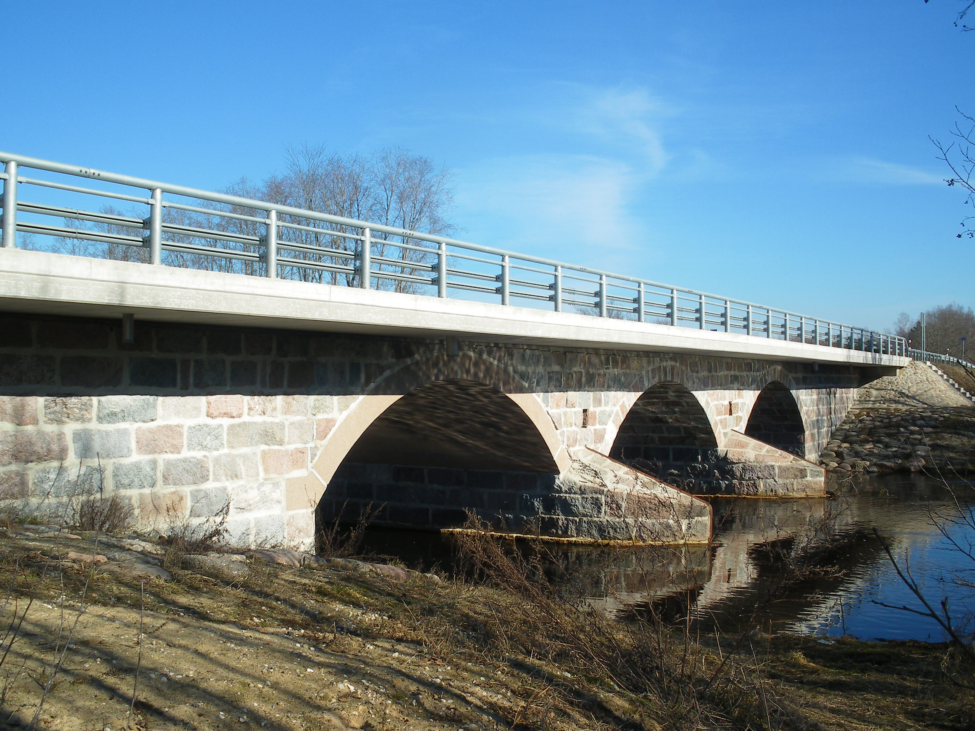 Soodla kivisild üle Jägala jõe pärast renoveerimistöid 2012. aastal.